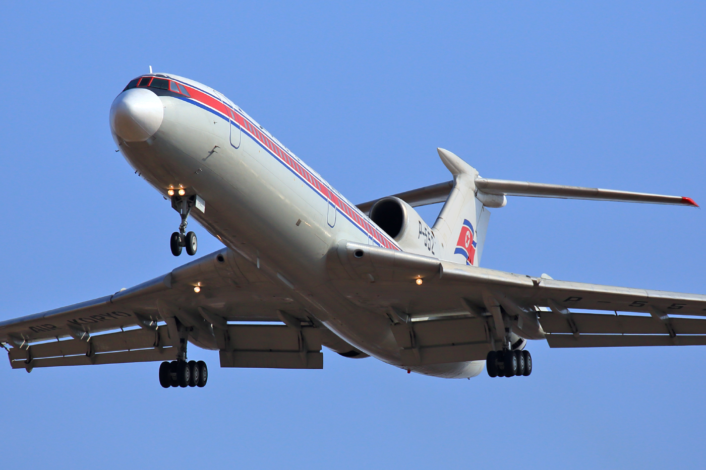 Air Koryo Tupolev Tu-154 at Vladivostok Airport